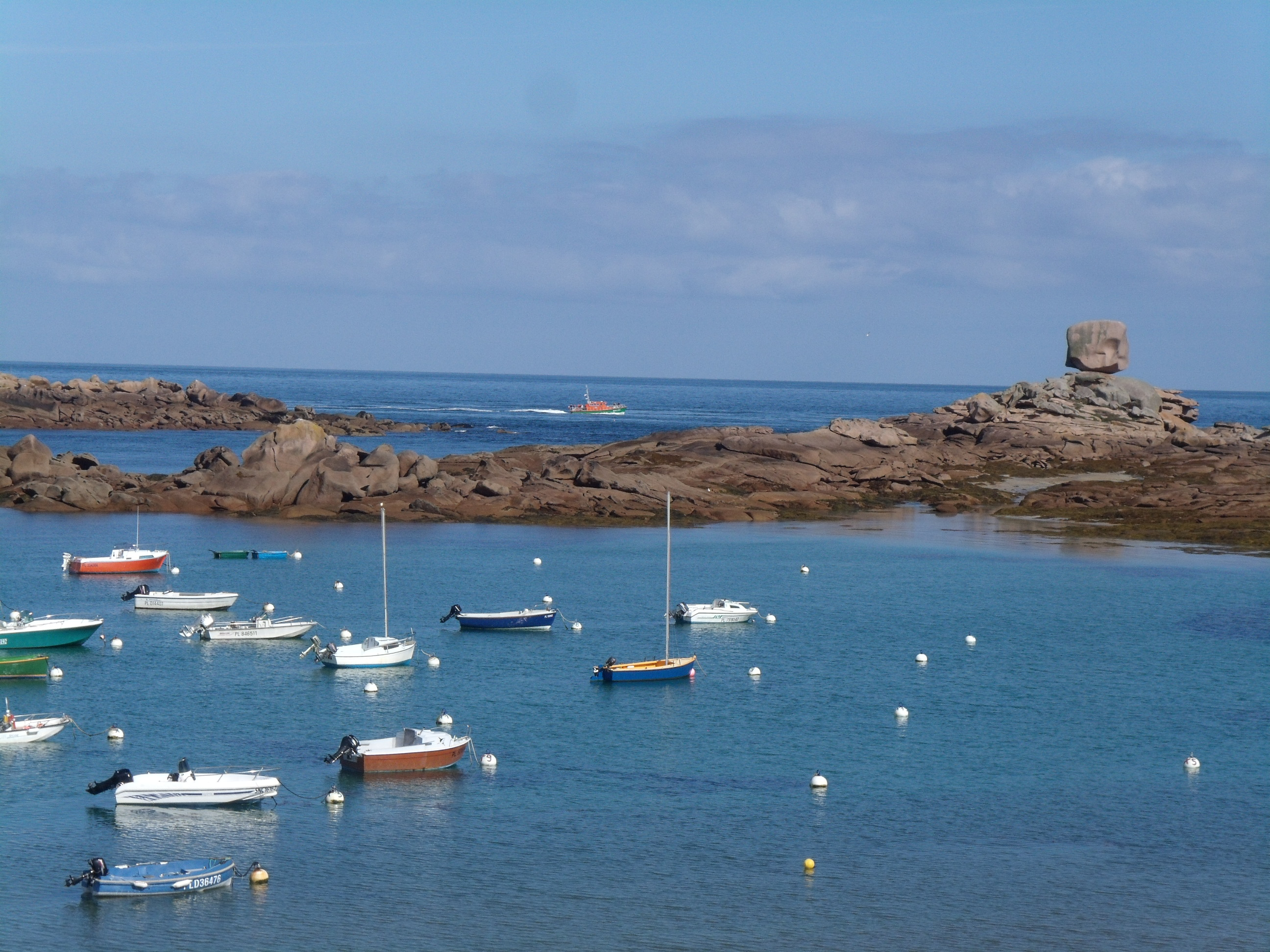 Trégastel, le petit port, le dé, et au large, le Président Toutain, vedette SNSM de Ploumanac'h